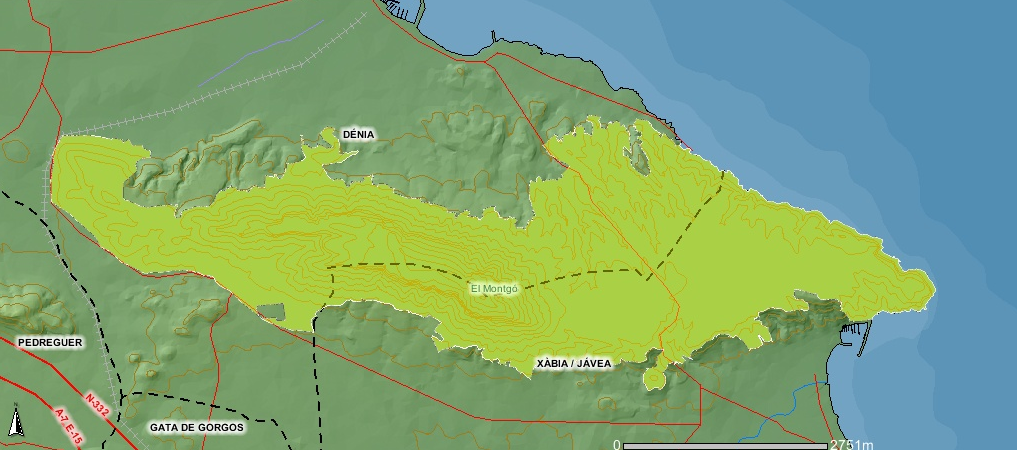 Mapa del parque natural de Macizo del Montgó